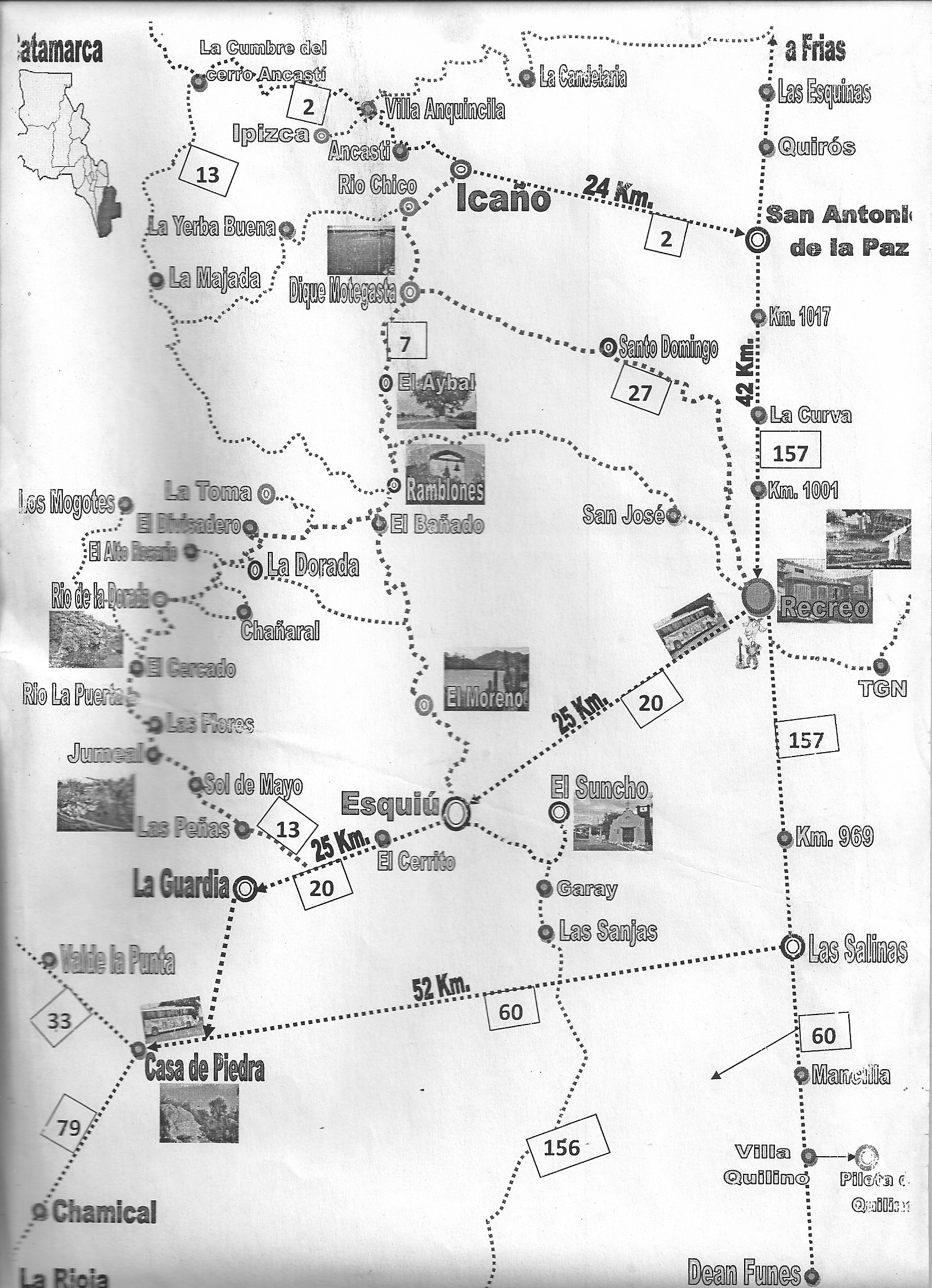 Maps Localidad de La Paz